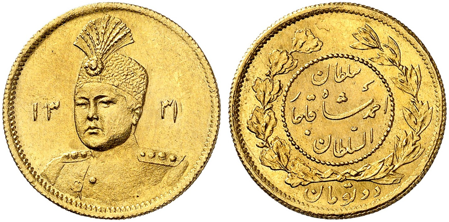 سکه دو تومانی سلطان احمدشاه